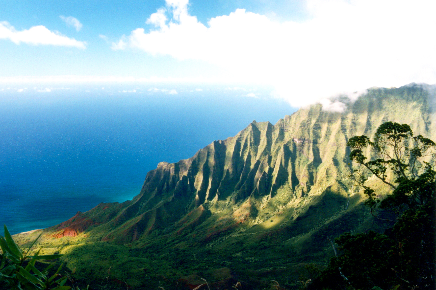 Na Pali Coast — Nā Pali Coast State Park, Kauai, Hawaii, August 1995.